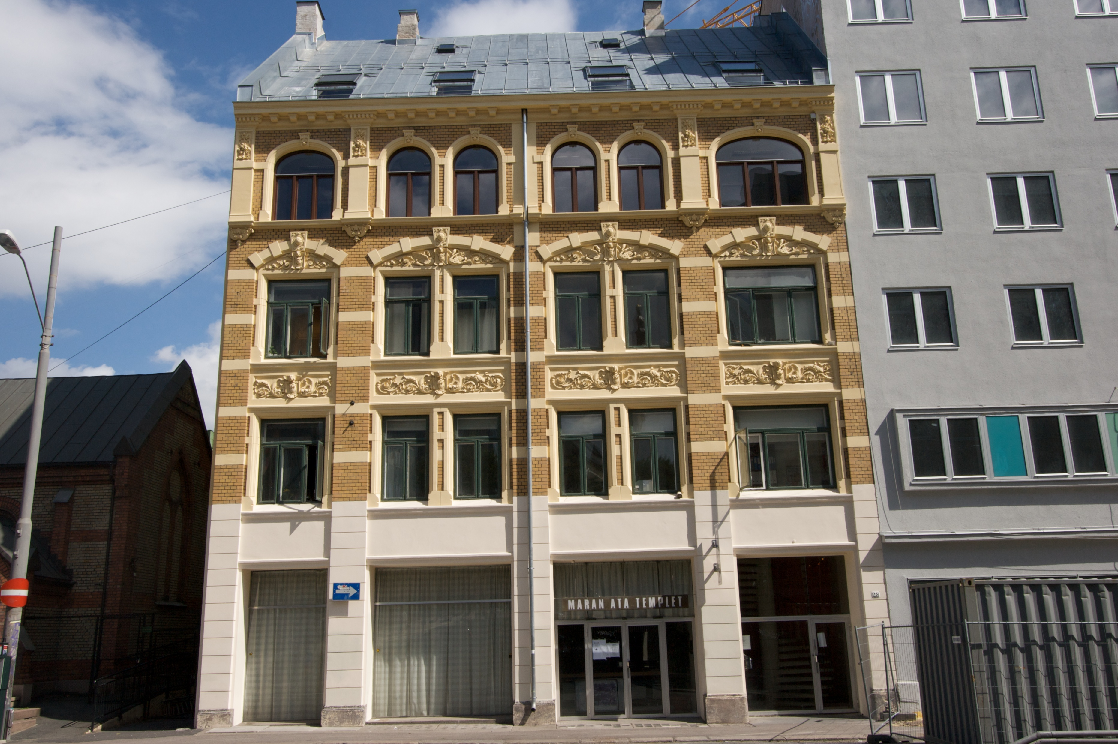 Maran-Ata Tempelet, Oslo. Møllergata 28 (ark. Ivar Cock, 1898), lokalt listeført bygårdsanlegg.